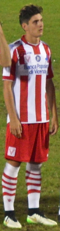 Formazione iniziale di Vicenza-Chievo